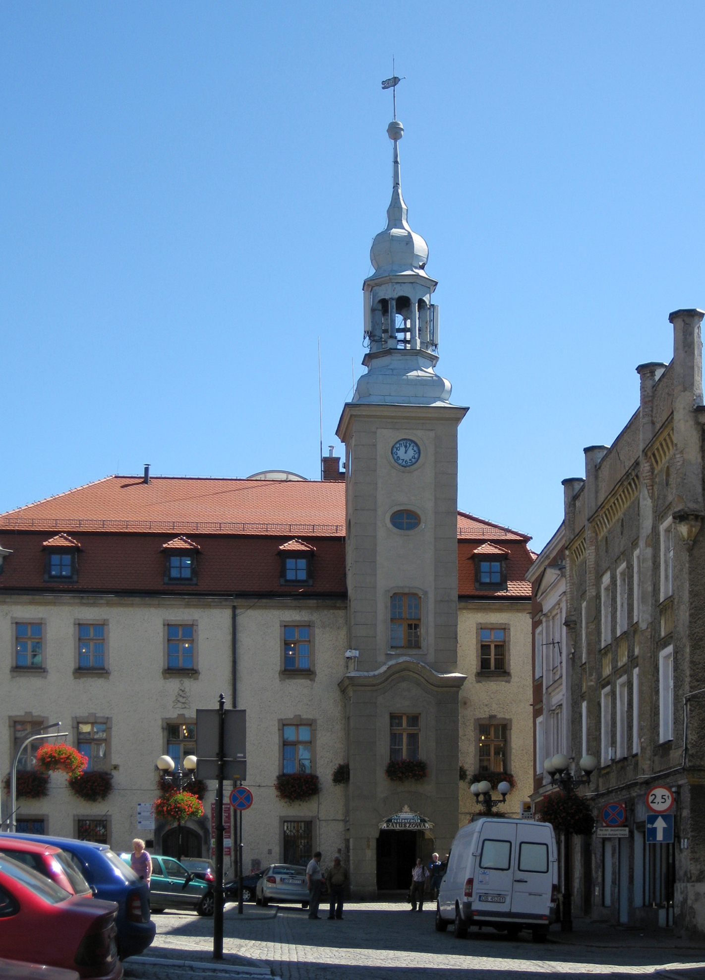 Ratusz w Boguszowie-Gorcach.